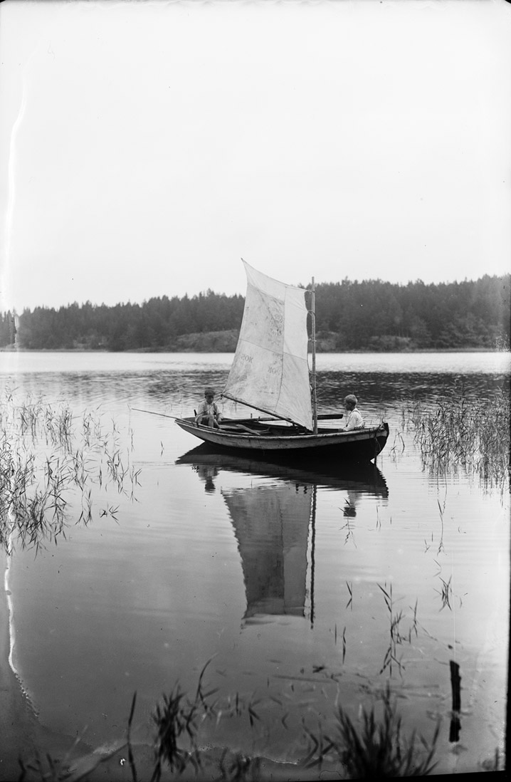 Julle "julli" från Möviken, Brinkas, Nagu, Finland. 1932. SLS, Folkkultursarkivet Signum: sls410a_23